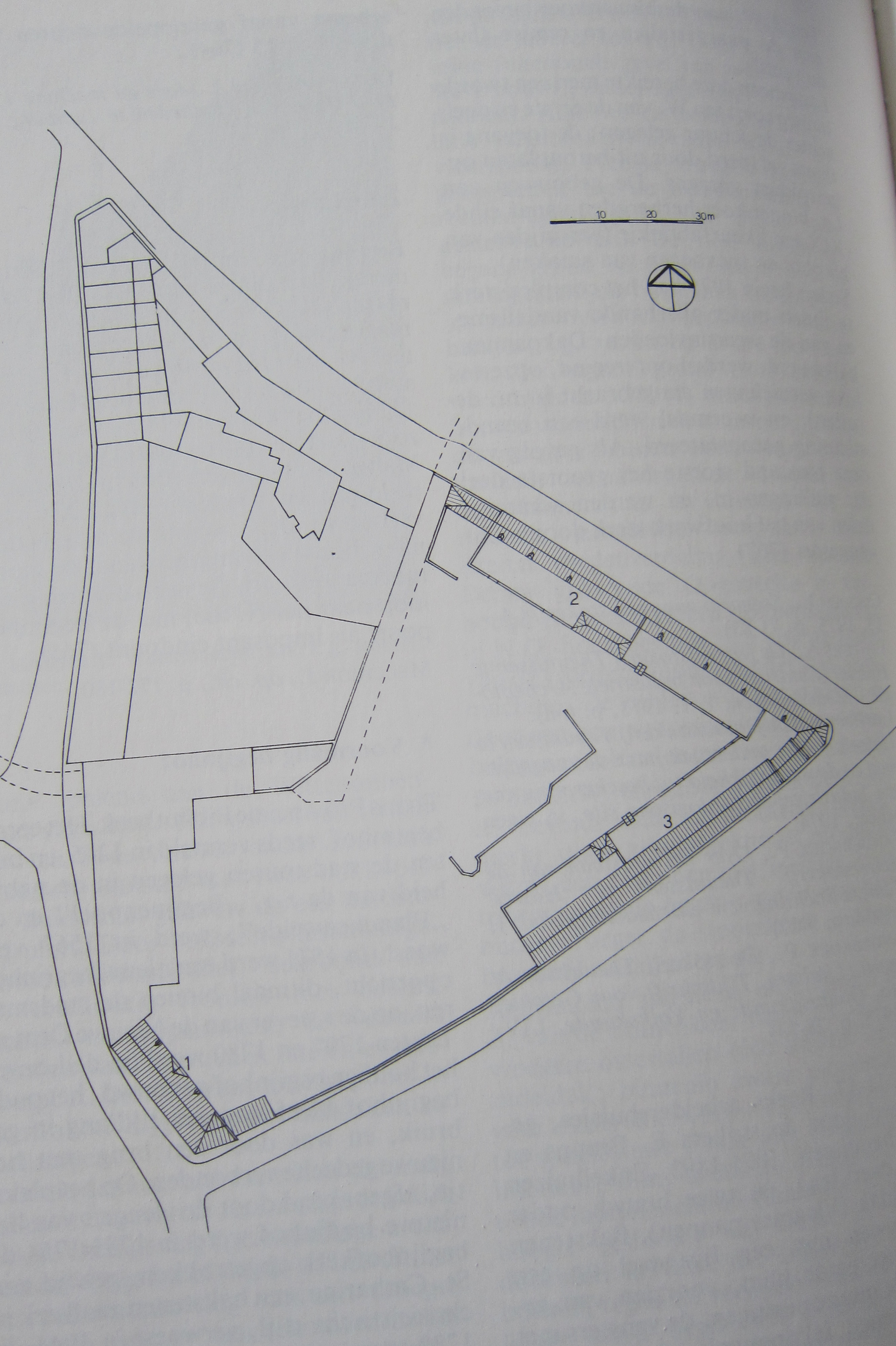 Algemeen plan voormalig begijnhof Hasselt (België)